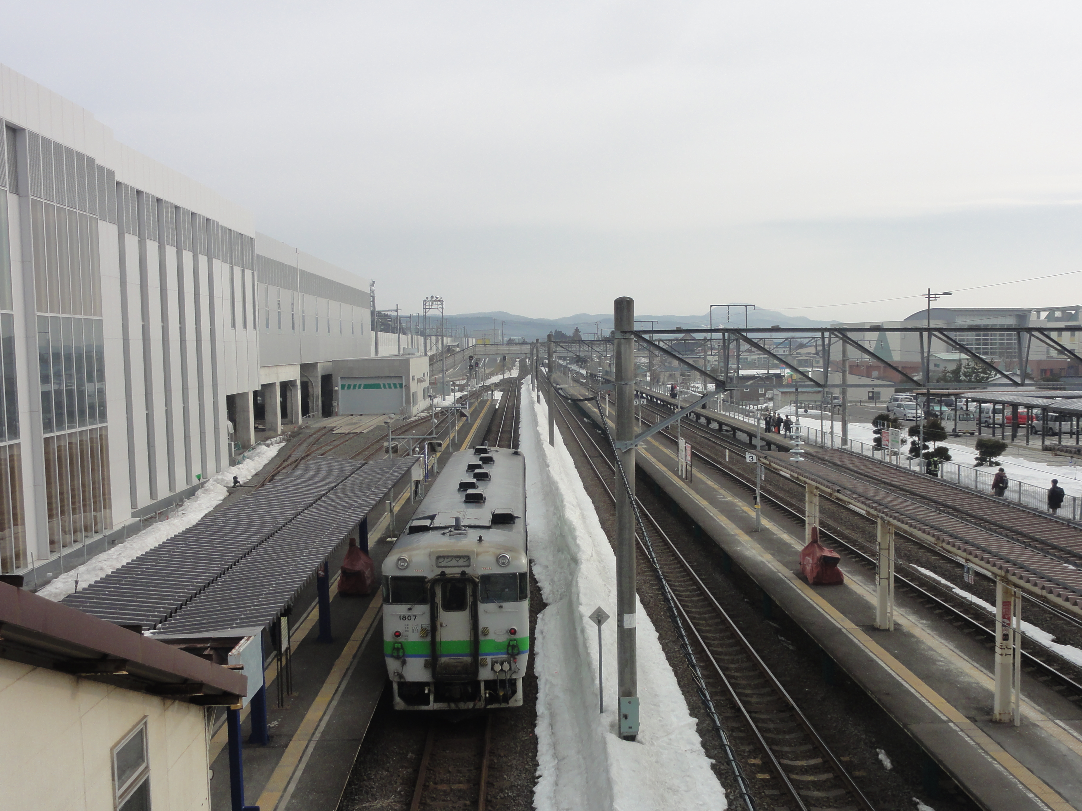 木古内駅ホーム